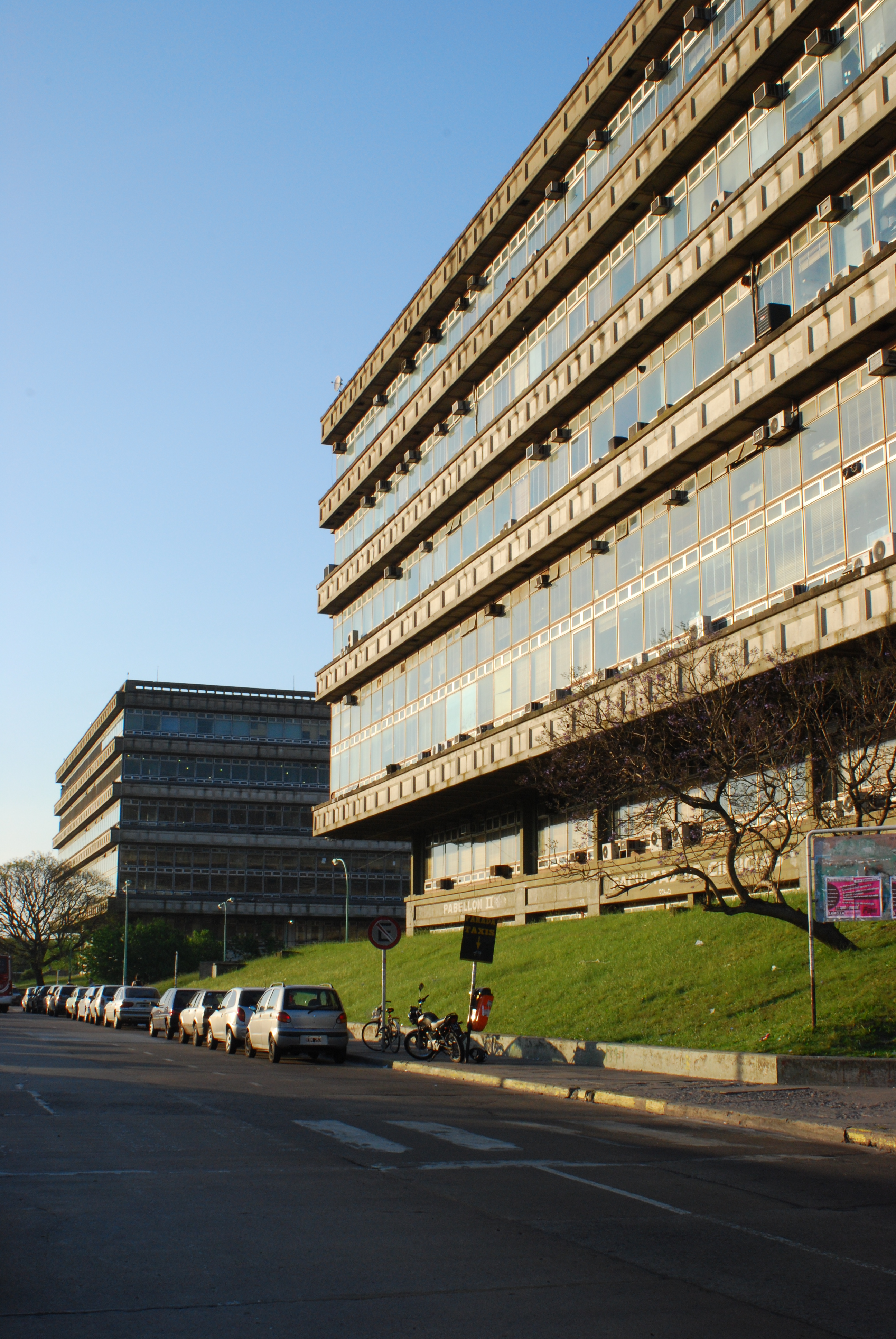 Pabellones 2 y 3 de la ciudad universitaria de Buenos Aires, Argentina, noviembre 2008